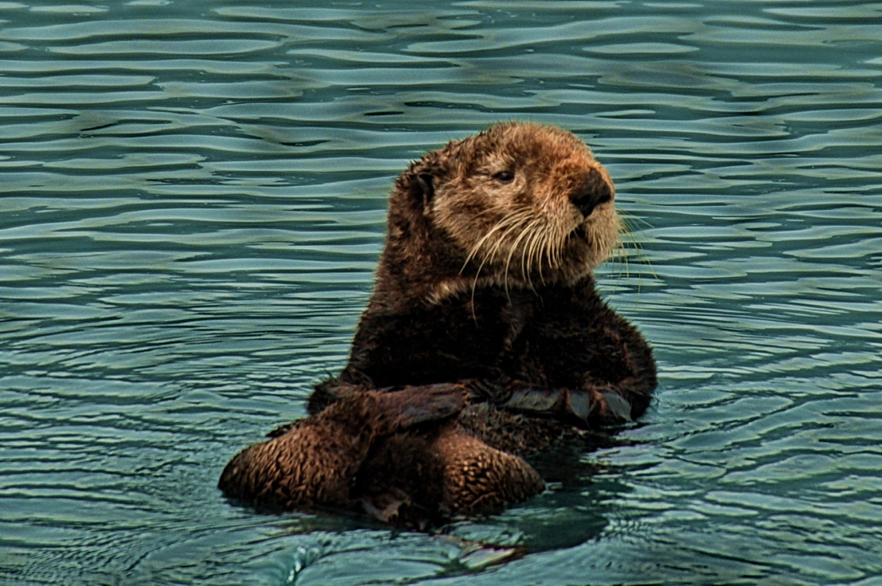 Sea Otter. Whittier, Alaska.